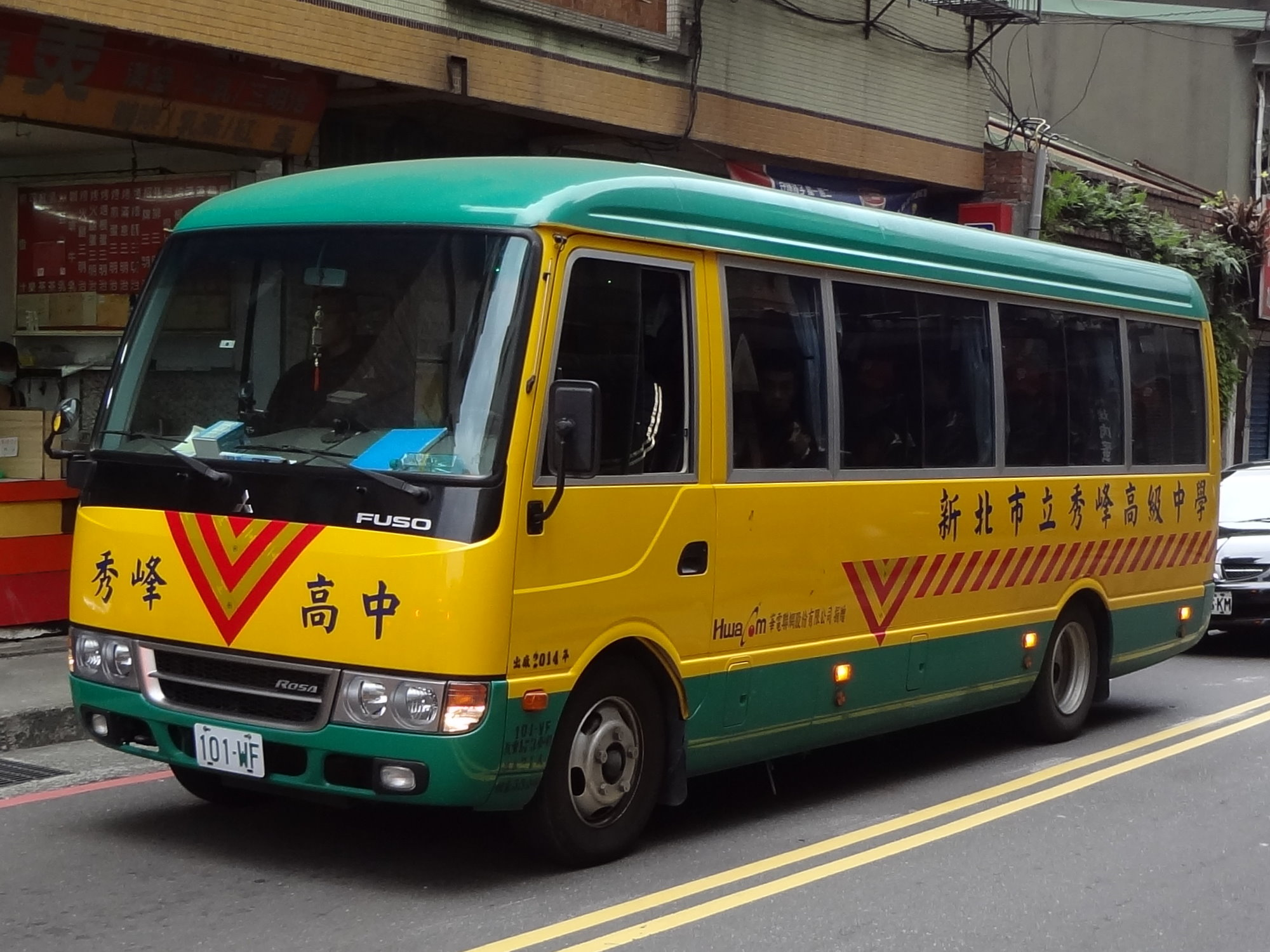 中文（台灣）: 新北市立秀峰高級中學Fuso Rosa交通車101-WF，華電聯網捐贈。停在新北市汐止區秀峰路。